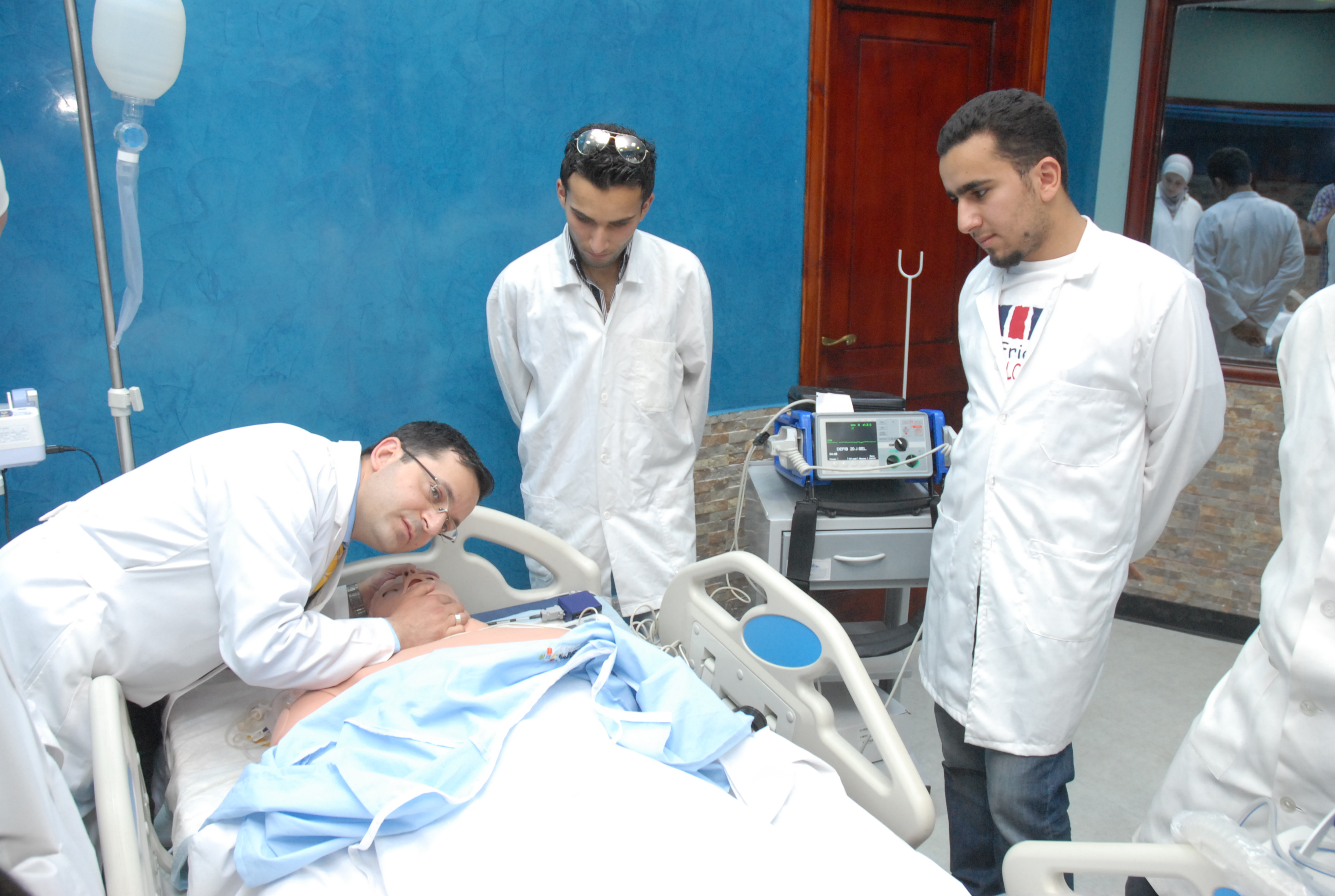 صور للجامعة